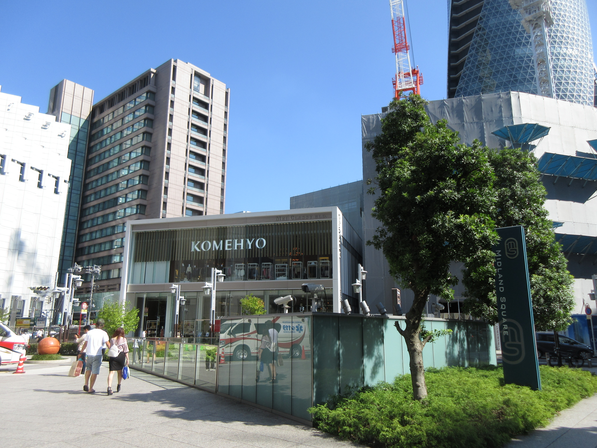 コメ兵 名駅店（名古屋市中村区名駅）